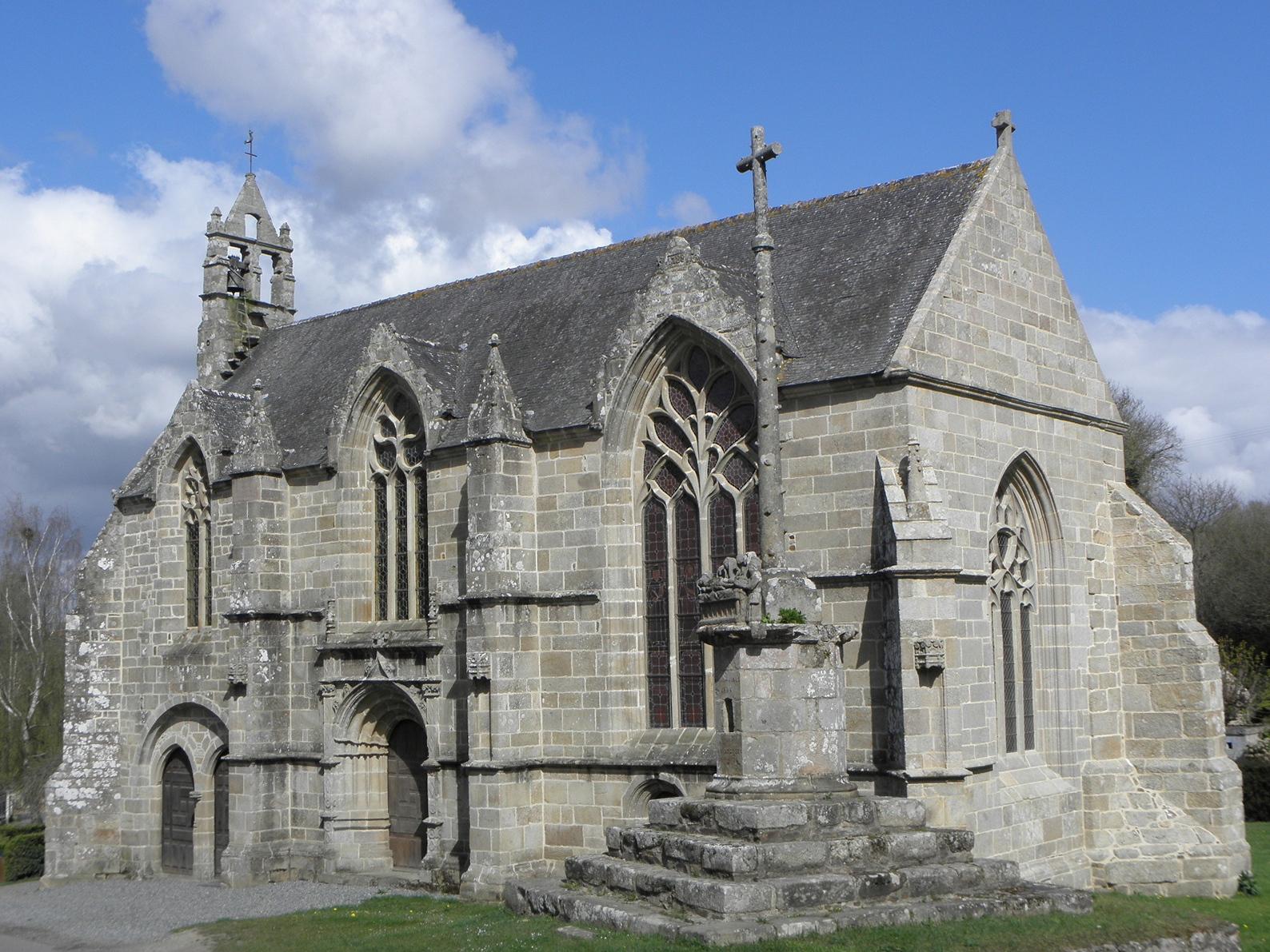 Calvaire, flanc sud et chevet de la chapelle Saint-Jacques de Tréméven (22).